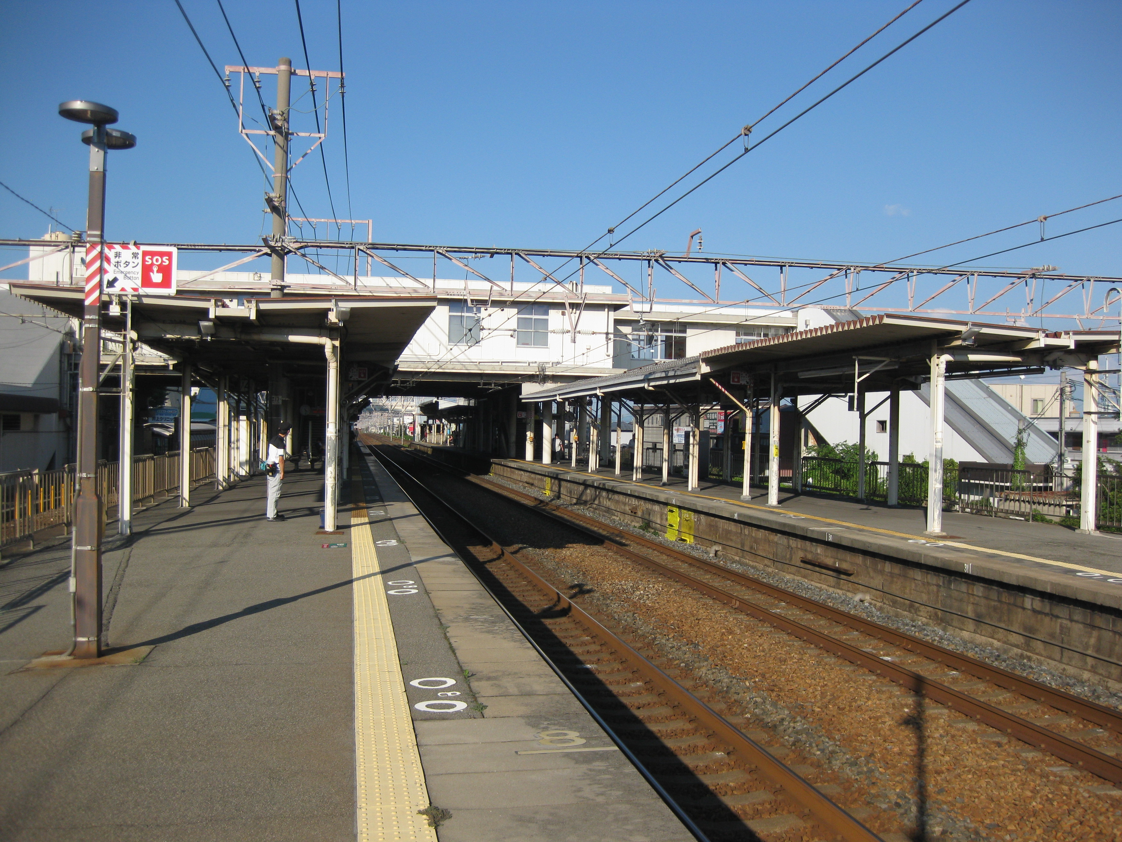 摂津富田駅プラットホーム